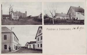 Pohlednice Domoradic